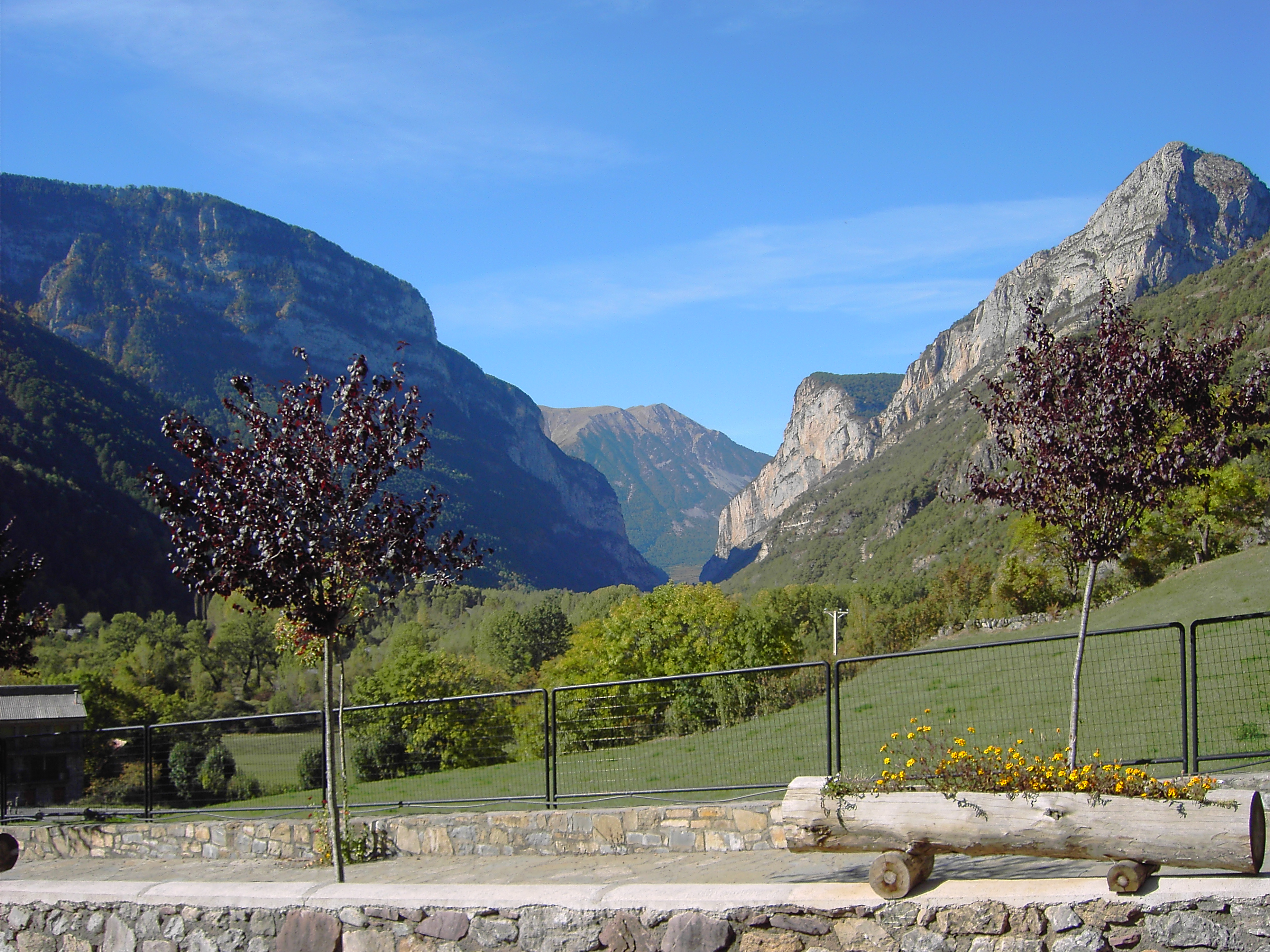 Vista desde Plan del tramo inferior de Chistau, con el estrecho que delimitan La Inclusa (izq.) y Las Leras d'el Mont (der.).